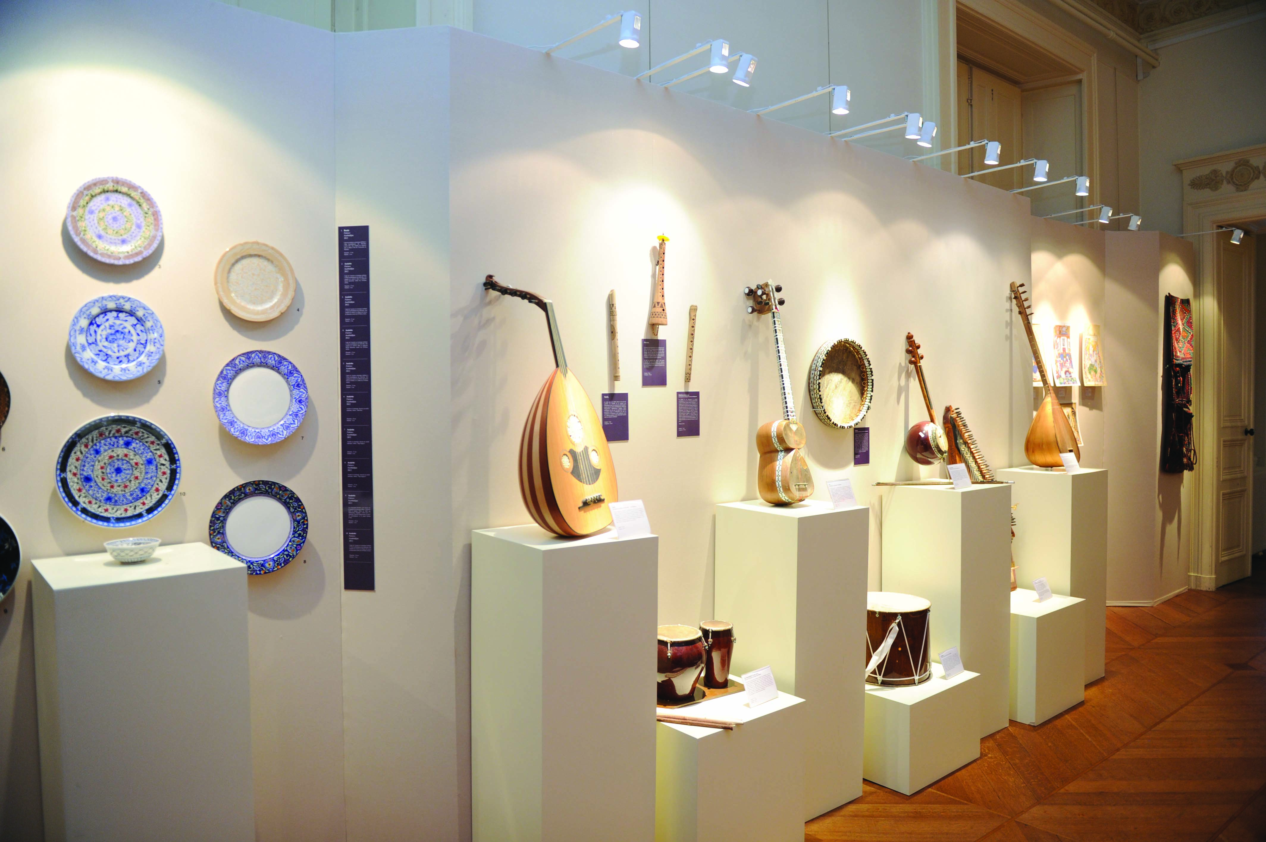 Fransada Azərbaycan mədəniyyət günləri çərçivəsində sərgi